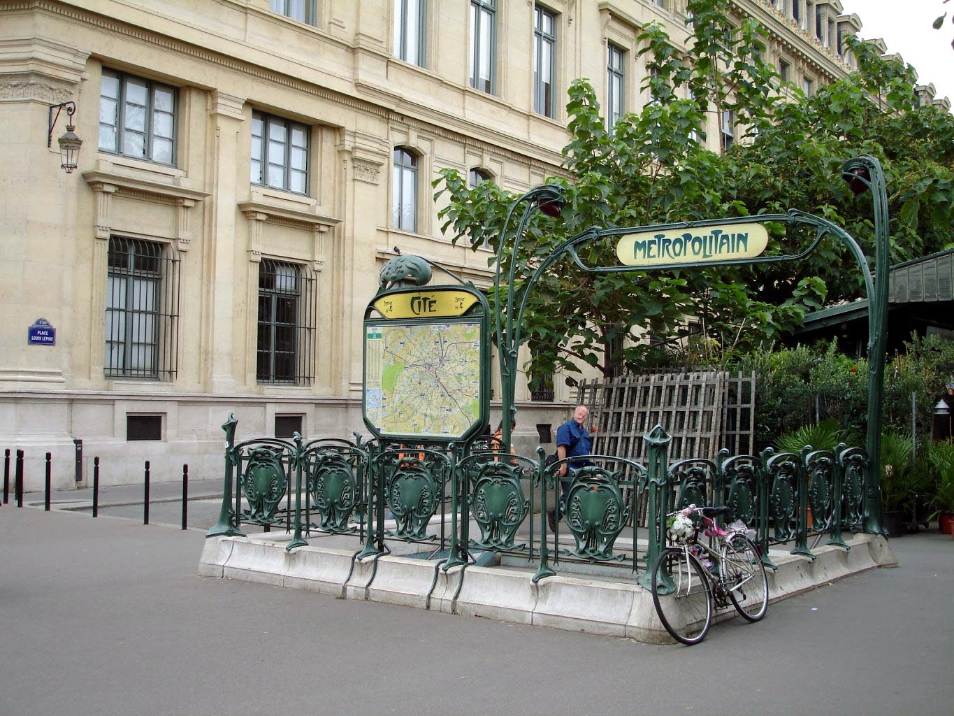 Entrée de la station Cité de la ligne 4 du métro de Paris, France